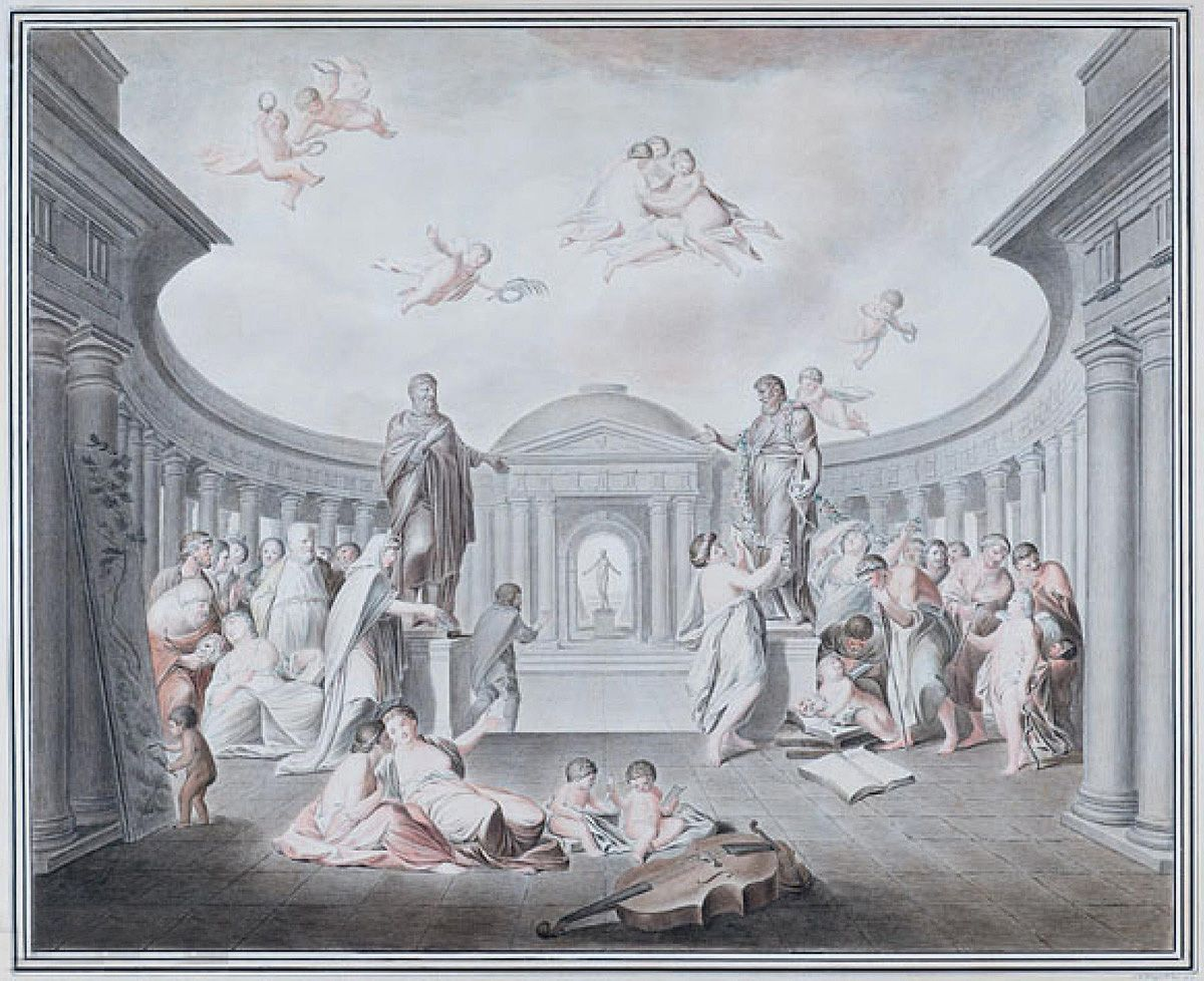 Darstellung des Theatervorhangs von Adam Friedrich Oeser (1717-1799) für das Alte Theater in Leipzig. Aquarell über Bleistift